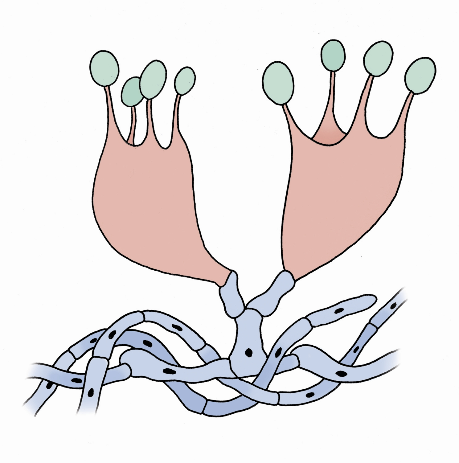 Basidie.